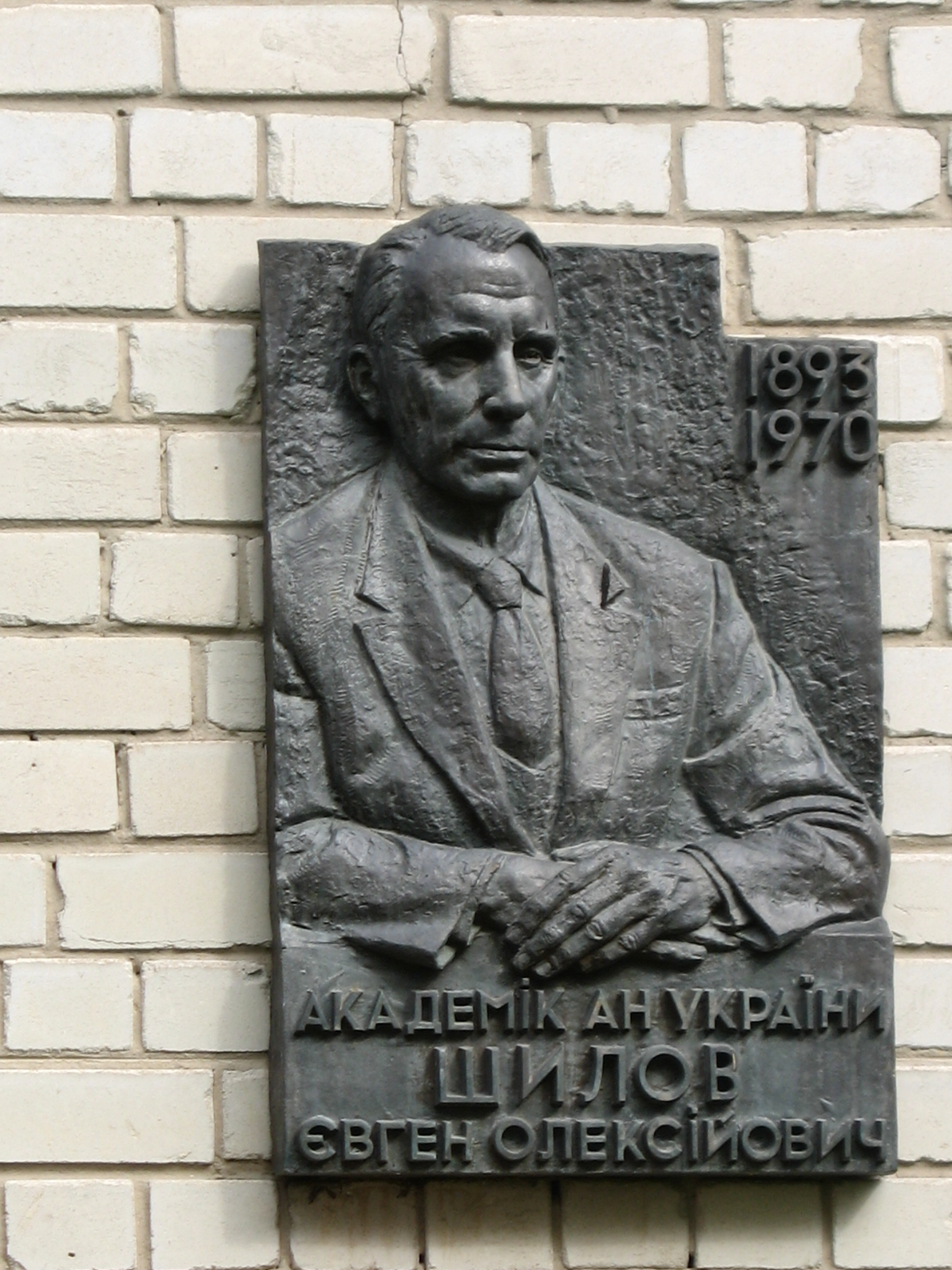 Меморіальна дошка на фасаді будівлі ІОХ НАН України на честь видатного вченого, академіка АН УРСР Шилова Є.О.